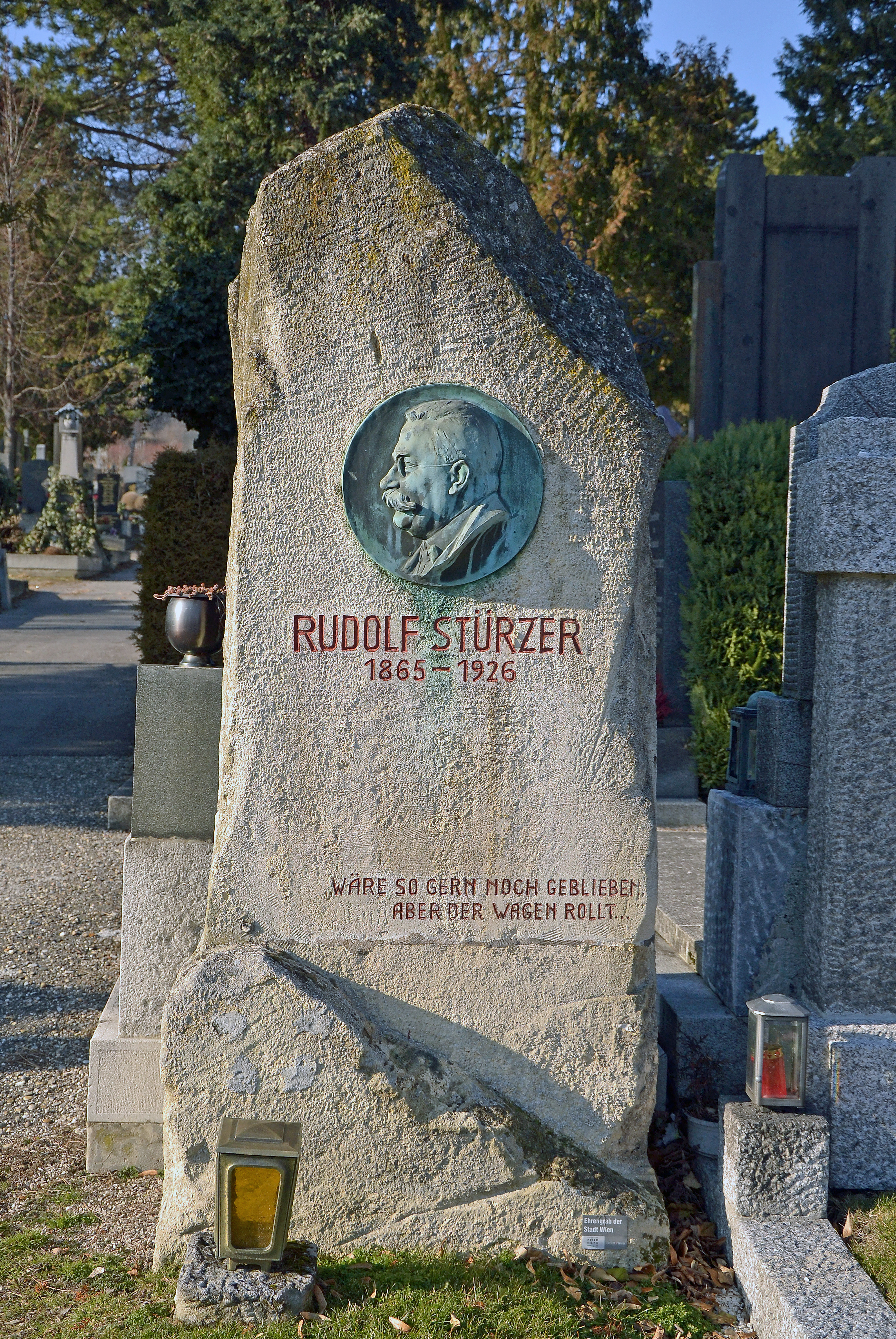 Schriftsteller Rudolf Stürzer, Friedhof Grinzing